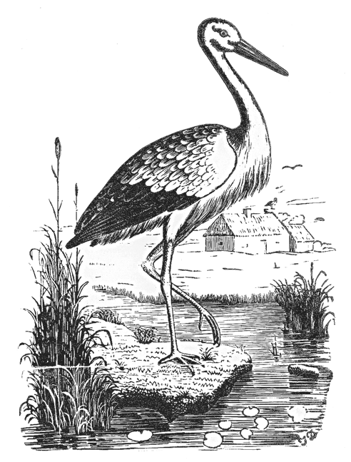 Illustratsioon väljaandele Ma-rahwa Kalender ehk Täht-ramat 1847 Ajastaja päle. (puugravüür)